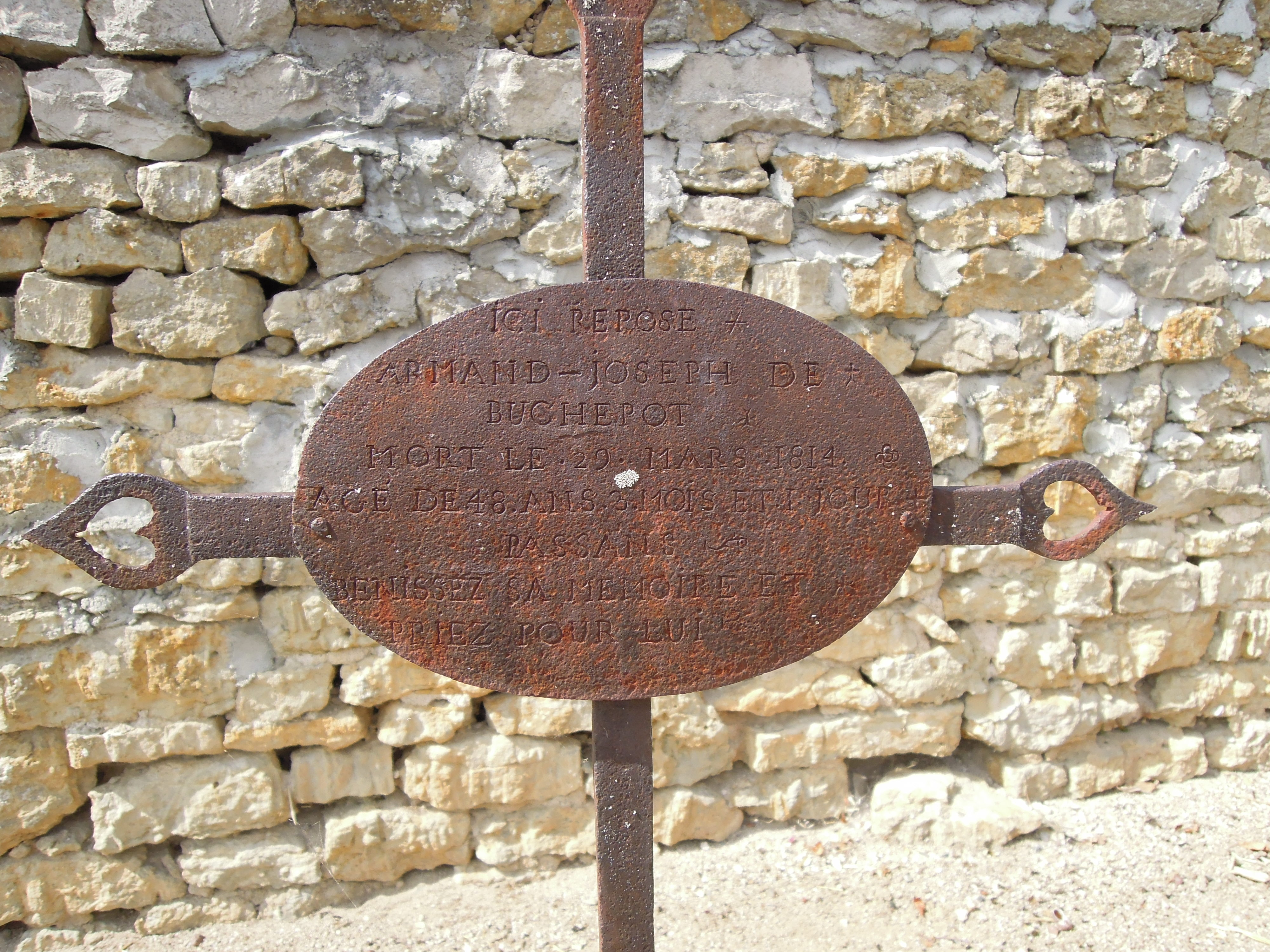 cimetière de Fougerolles, Indre. Septembre 2016.